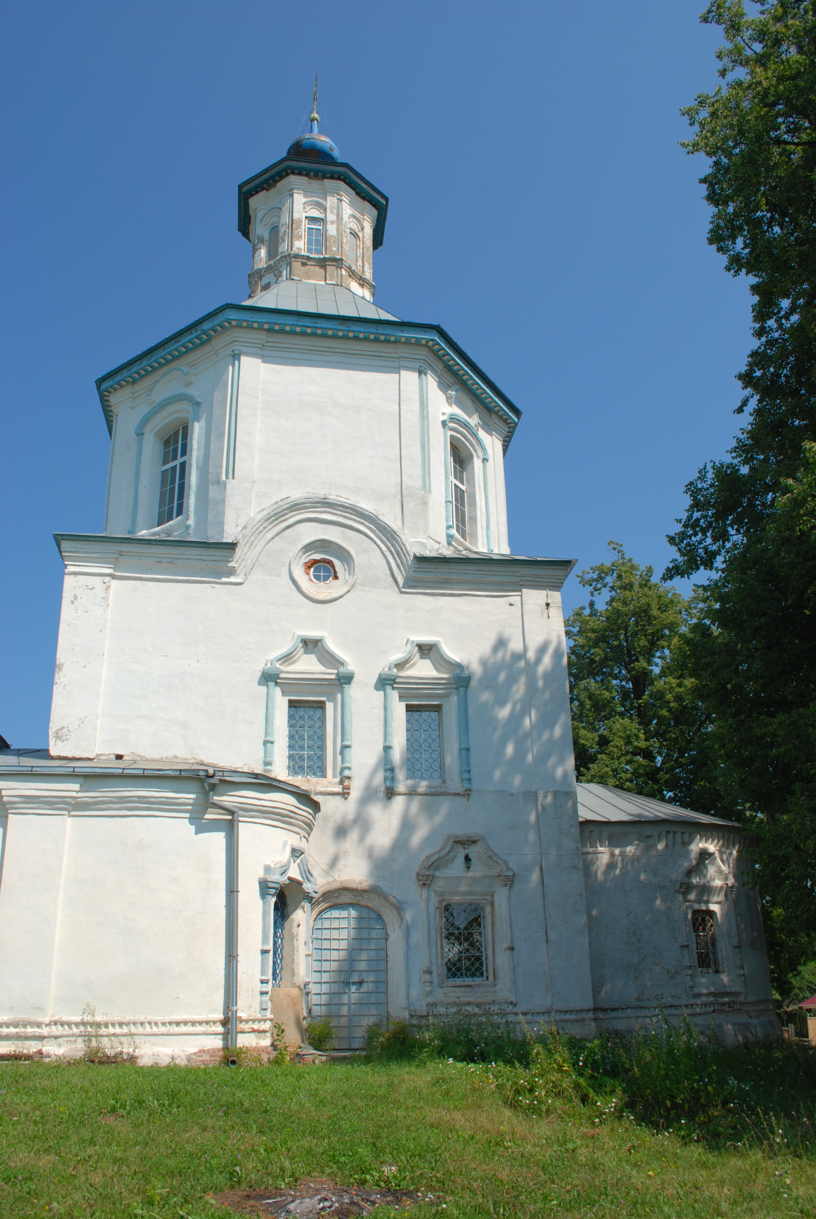 Церковь Георгиевская (Пресвятой Троицы) (Калужская область, Мосальск, Дзержинского улица)